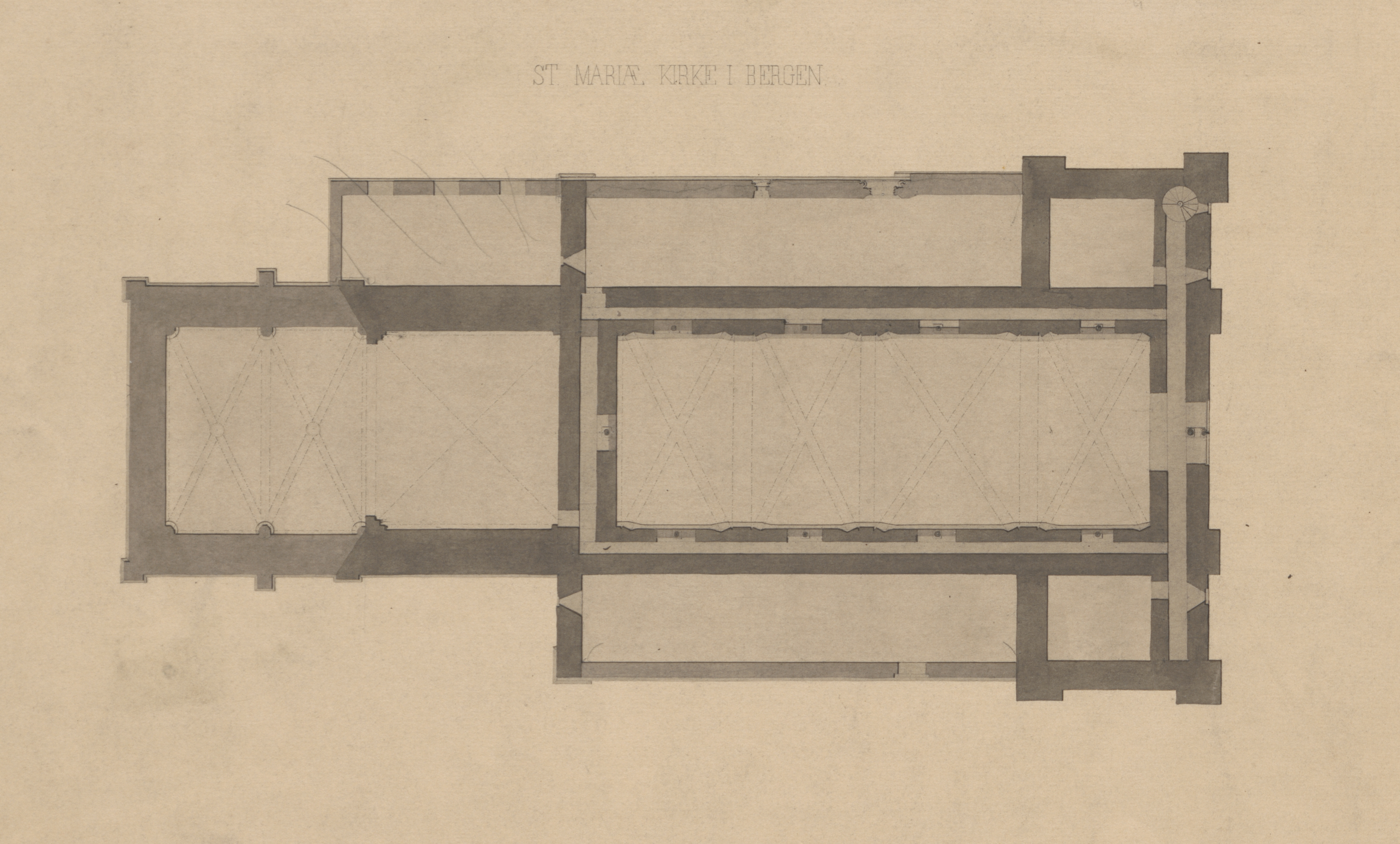 Bildet er hentet fra Riksantikvaren. plan (FF kat.nr. 254) Eier : Fortidsminneforeningen Sted : Norway, Hordaland, Bergen Emneord: "MIDDELALDER, STEINKIRKER" Medium : "Tusj;Akvarell"